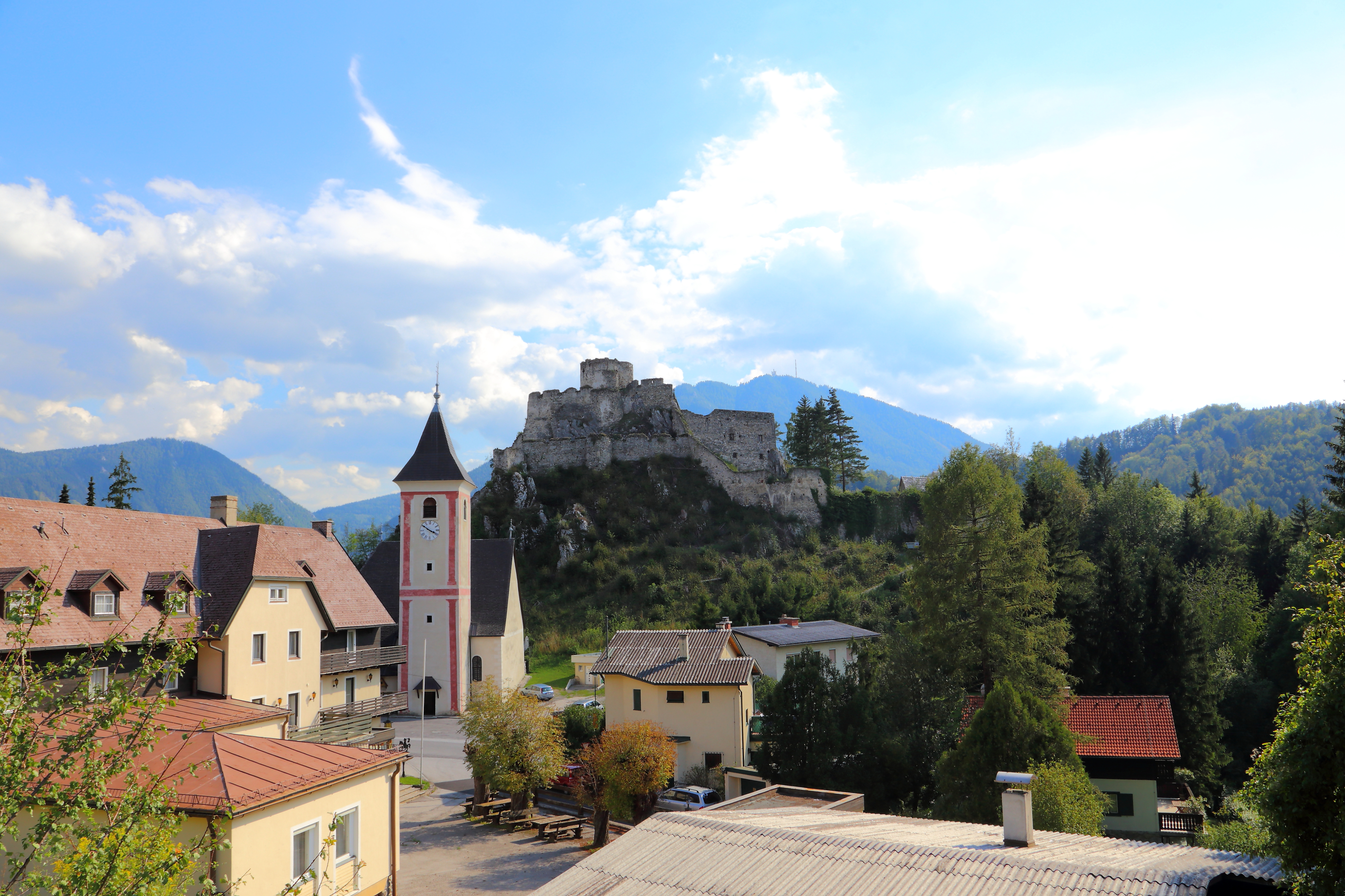 Nordansicht der Ortschaft Klamm, ein Ortsteil der niederösterreichischen Gemeinde Breitenstein, mit der gleichnamigen Burgruine und der Pfarrkirche hl. Martin.